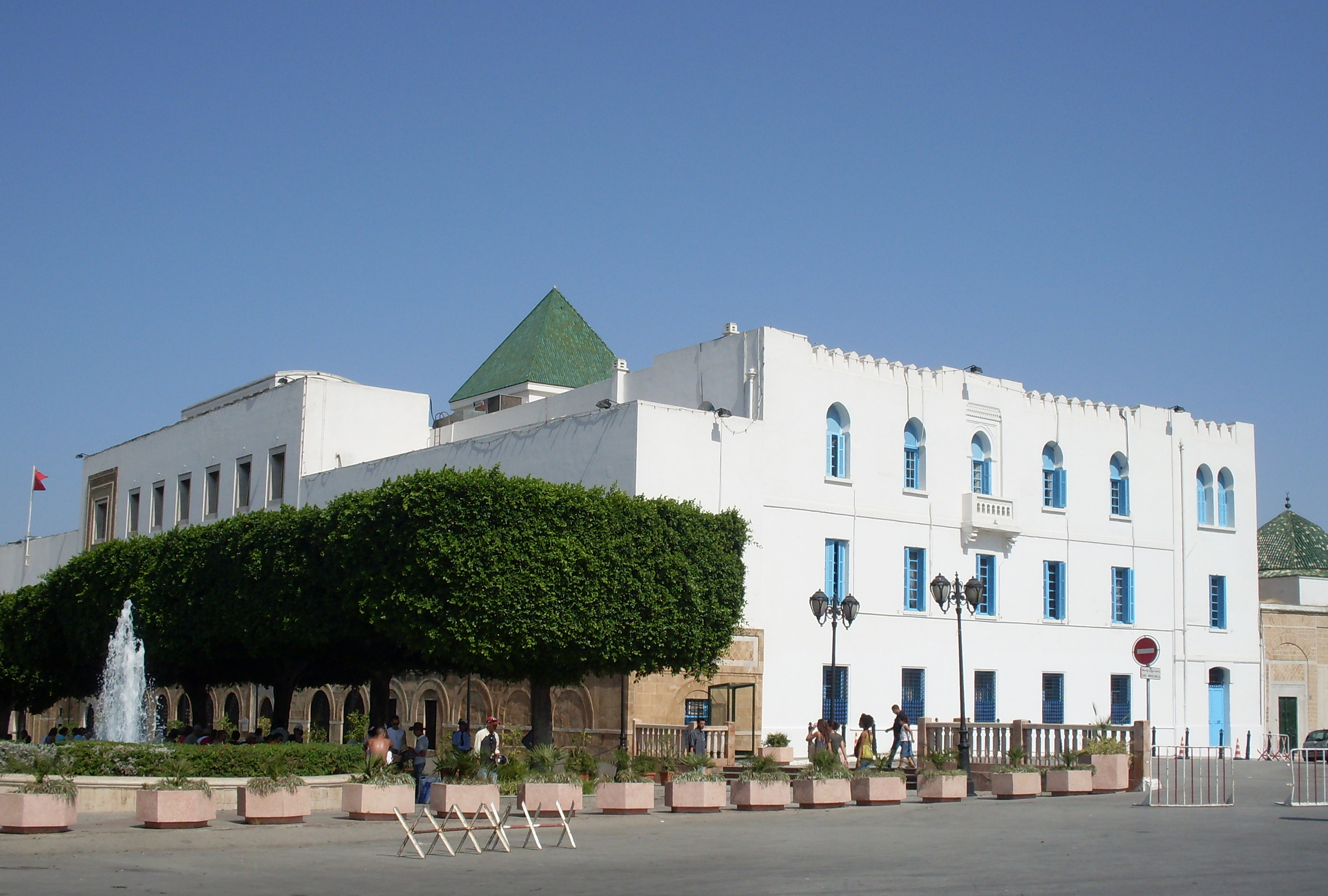 Medina de Tunis, Ksar El Bey actuel Palais du gouvernement